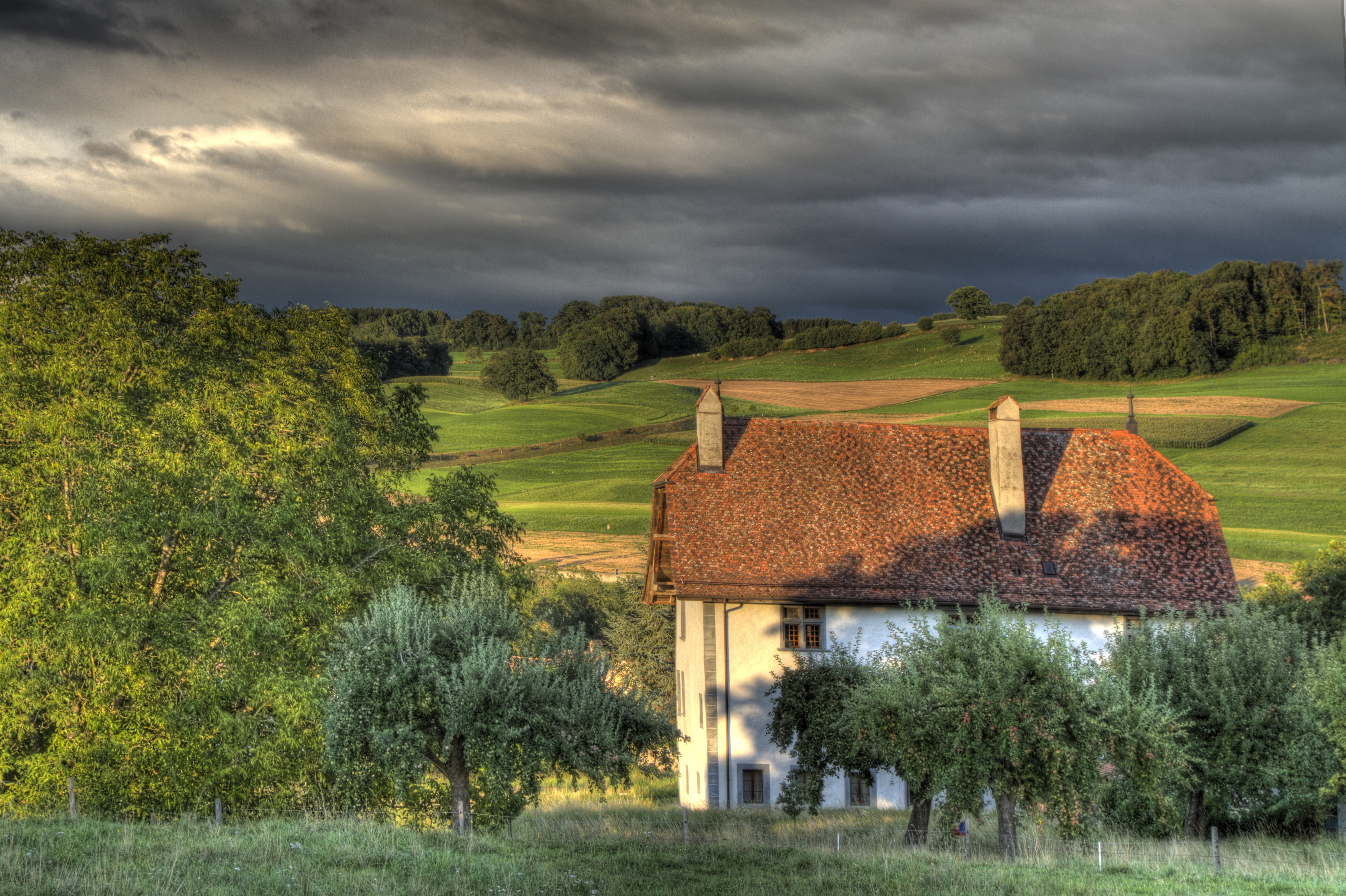 Les hauts de Curtilles et son Château